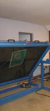 Mahaia Biratzen